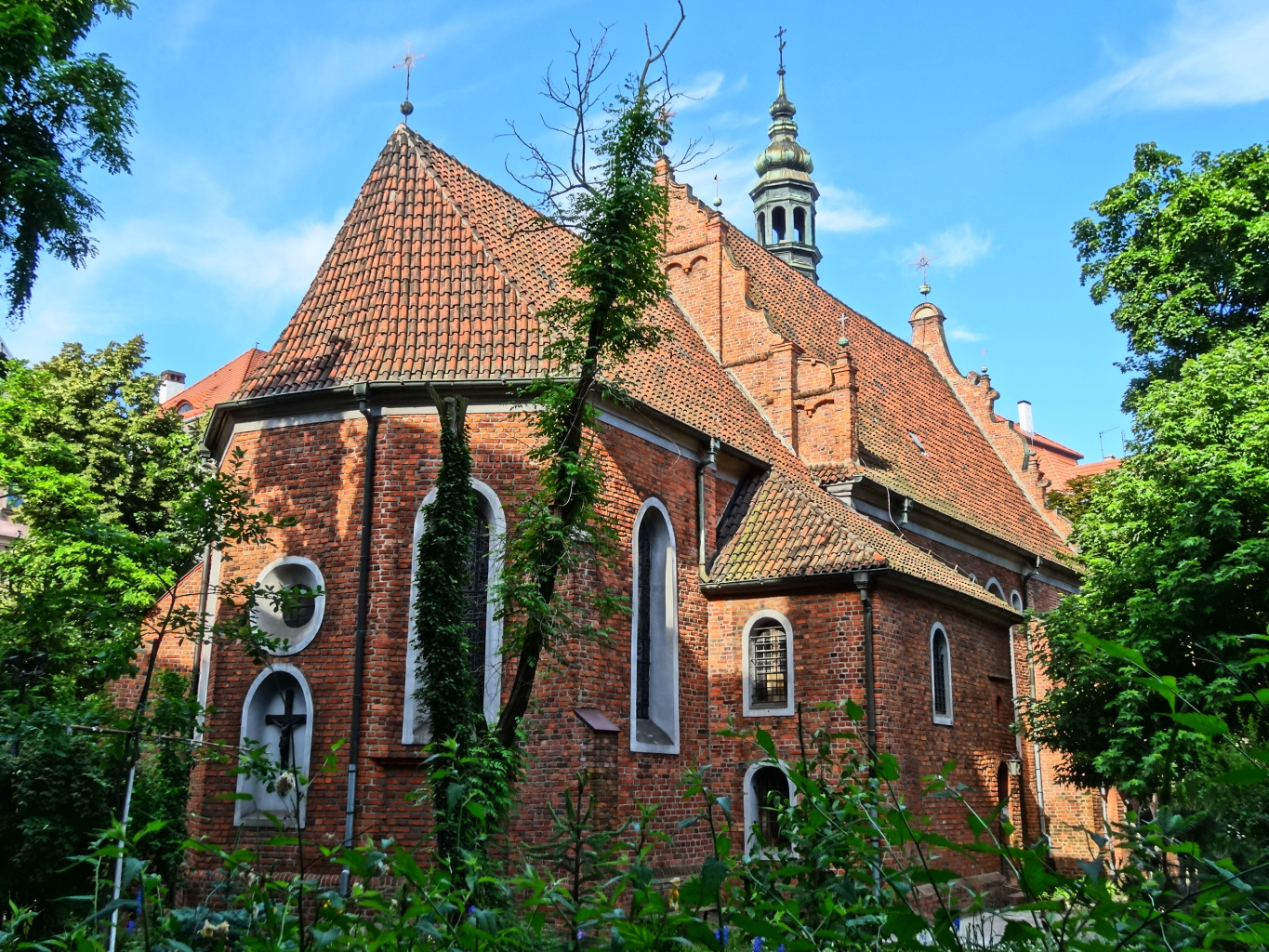 Kościół p.w. Wniebowzięcia Najświętszej Marii Panny w Bydgoszczy (zbud. 1582-1615, do 1835 r. kościół klasztorny klarysek bydgoskich)